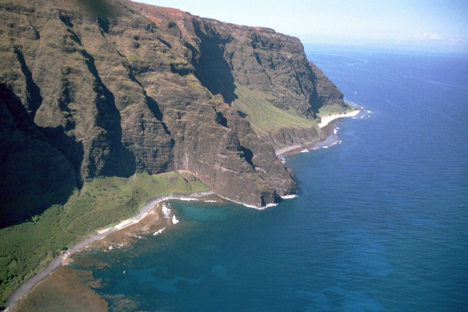 Insel Kauai Flug über Nordküste